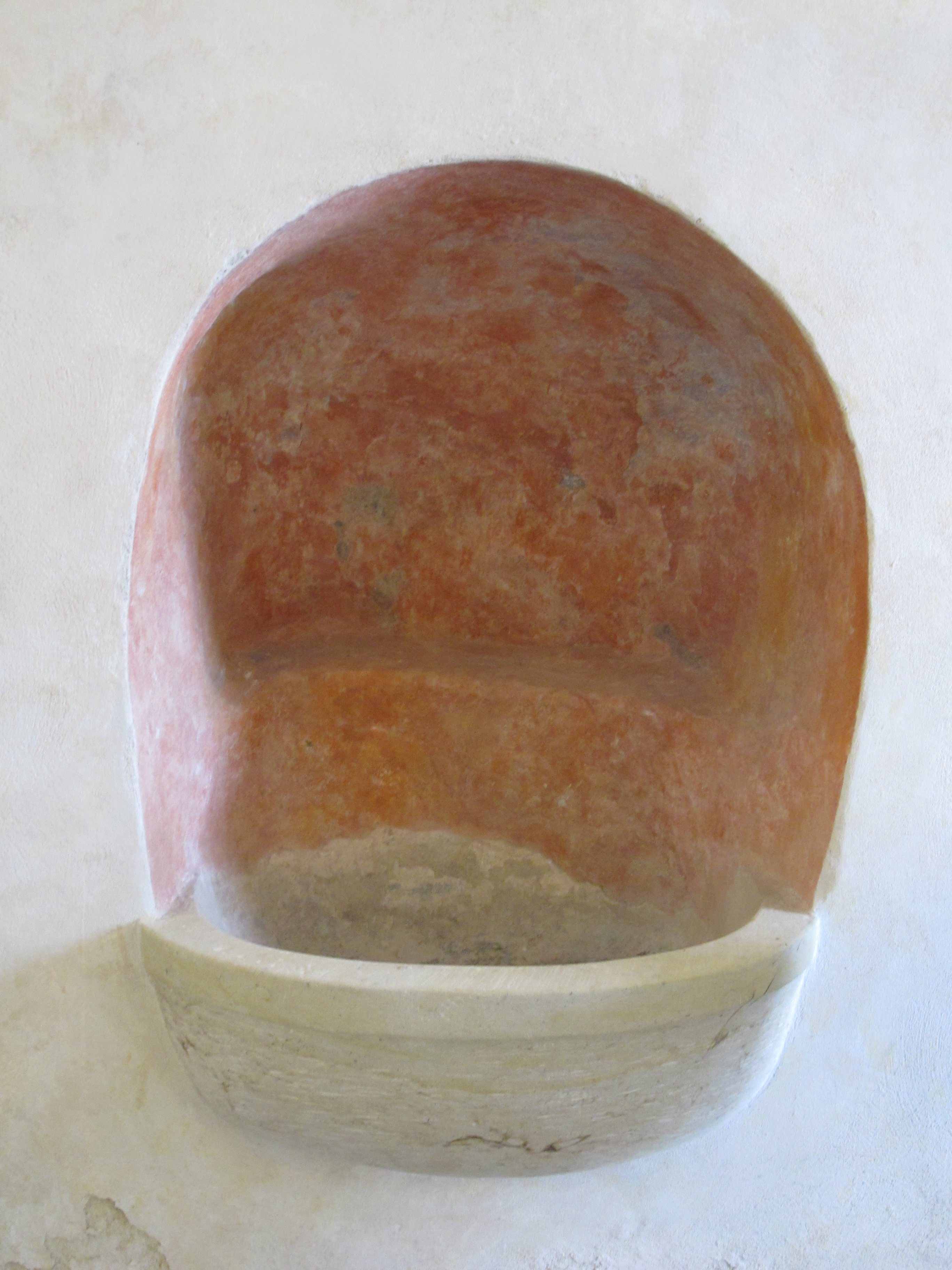 Synagoga, Krajířova, Turnov.